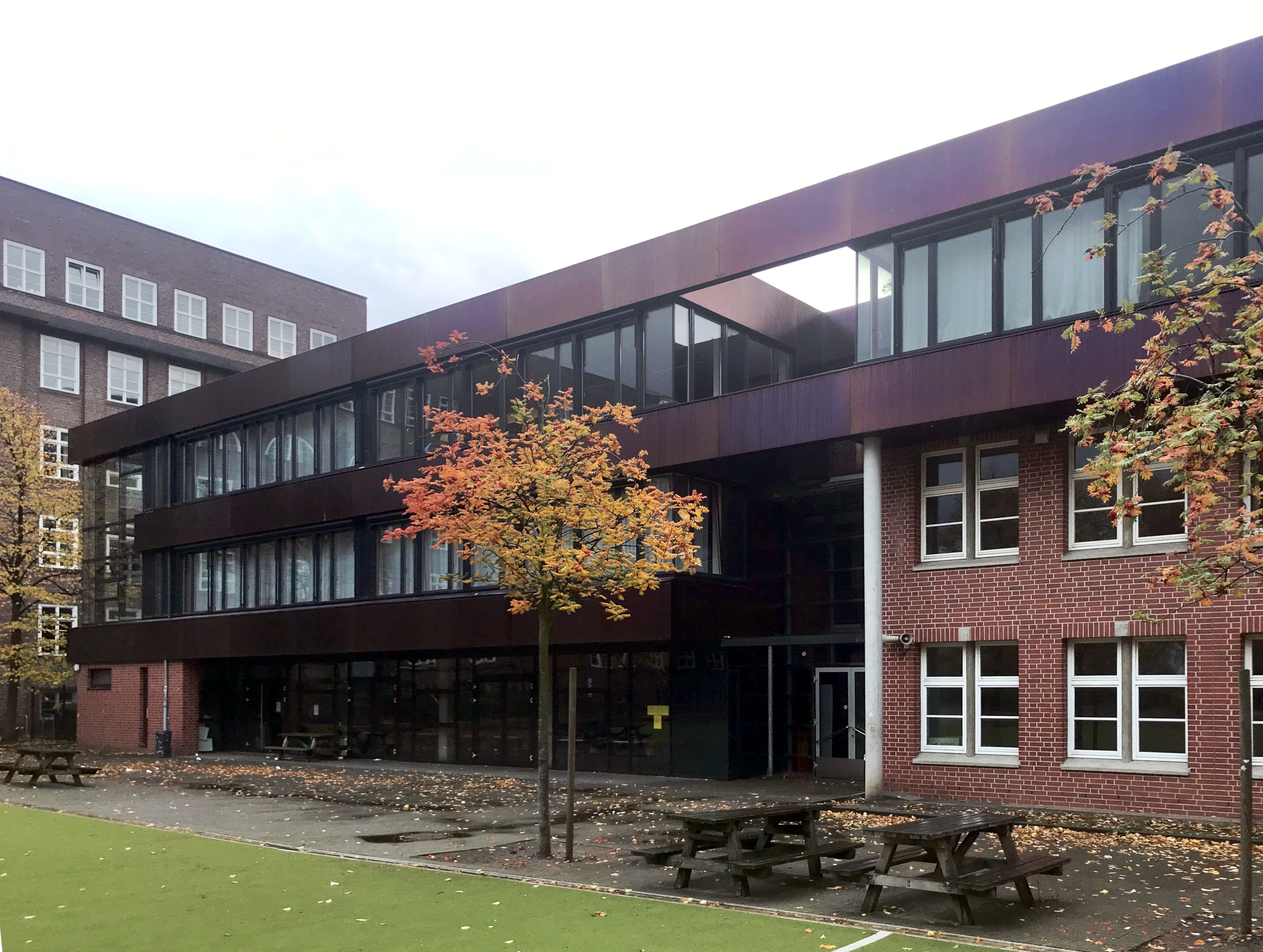 Klosterschule Hamburg, Erweiterungsbau (Haus B und C) errichtet von 2006 bis 2007 (dreistöckig mit Kupferfassade) bzw. 1995 (zweistöckig, mit Backsteinfassade.